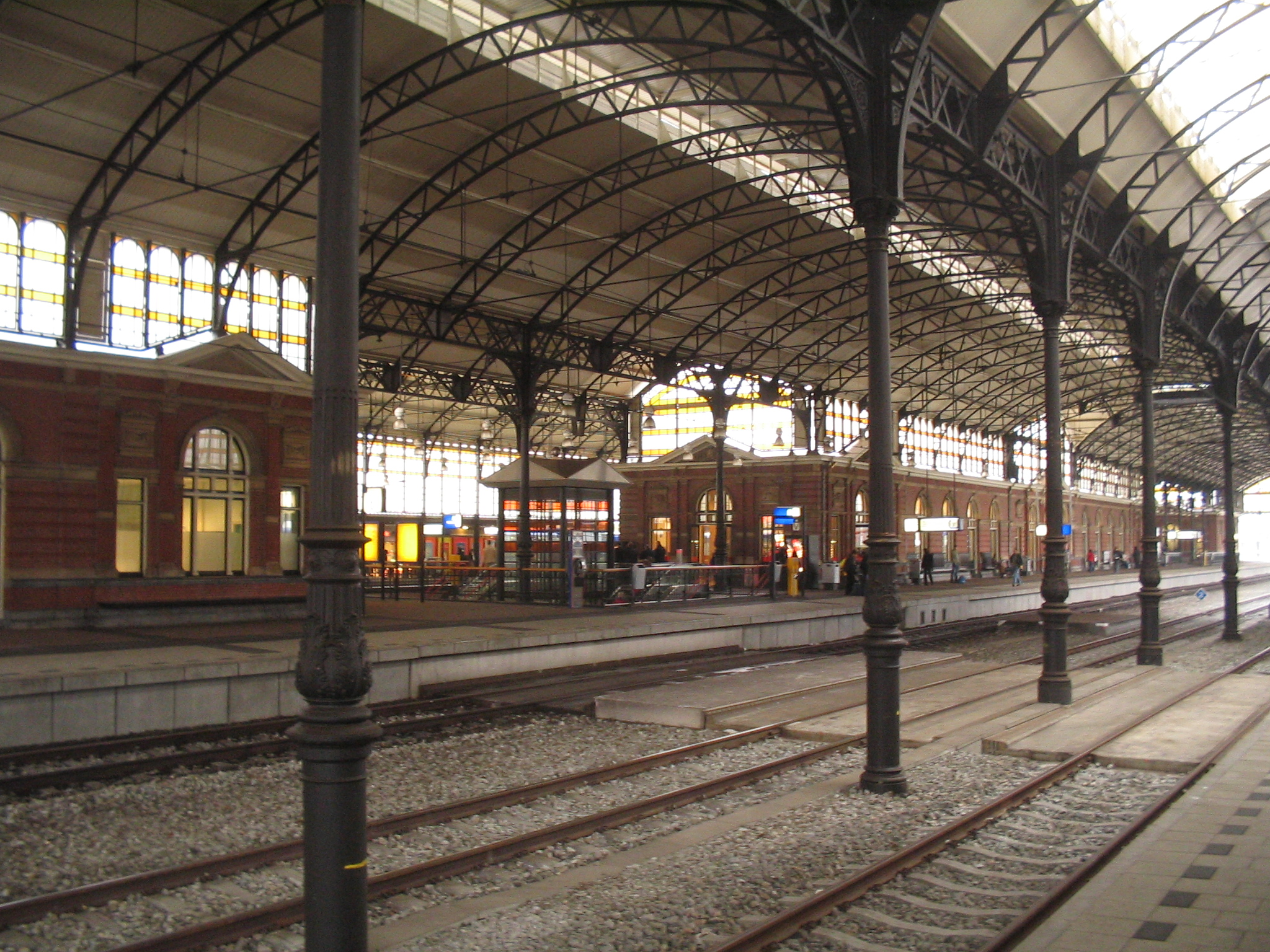 Station Den Haag HS, Netherlands, 21 oktober 2005